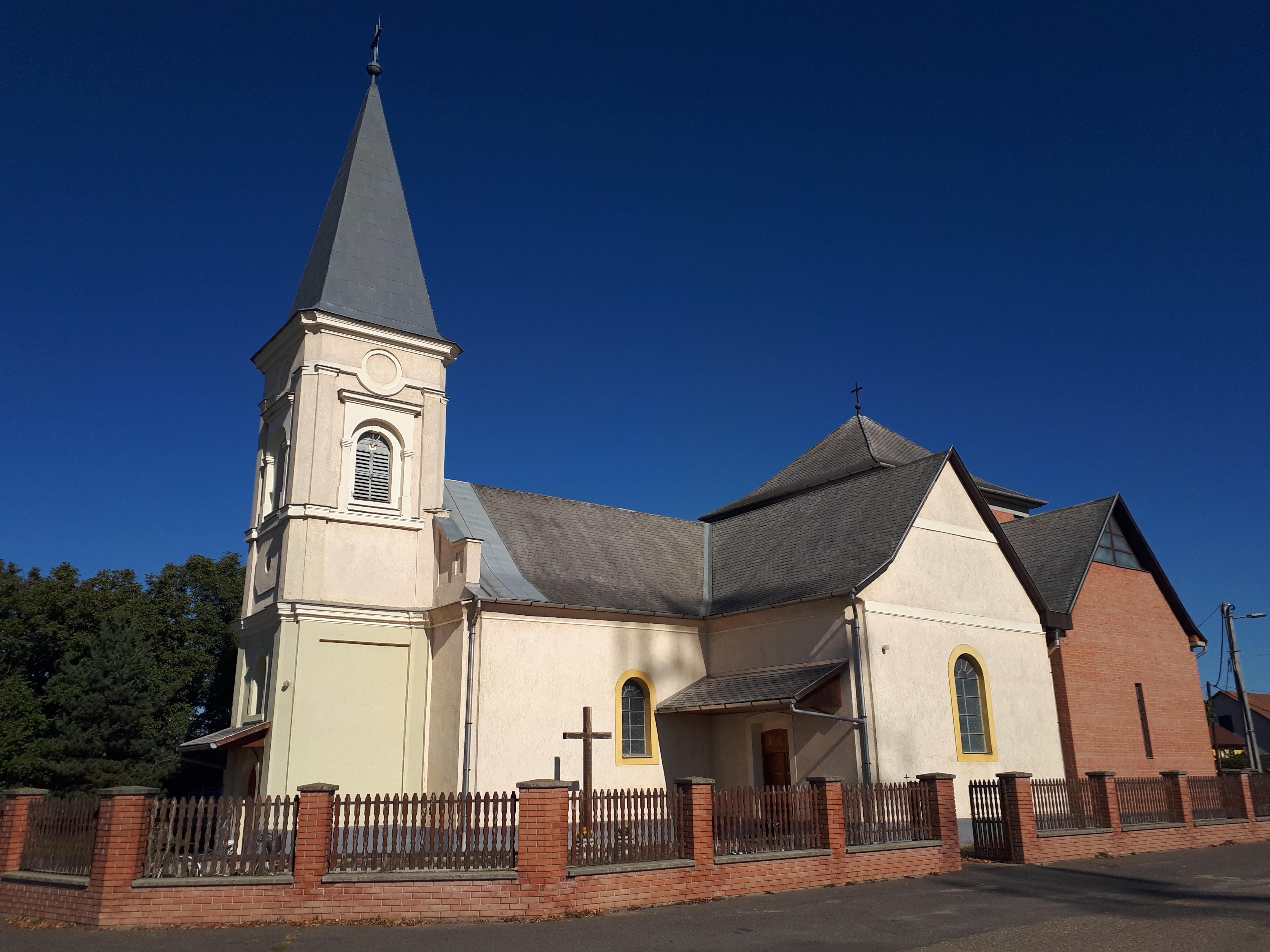 Hernádnémeti Szent Joachimról és Annáról elnevezett, 1769-ben épült római katolikus temploma